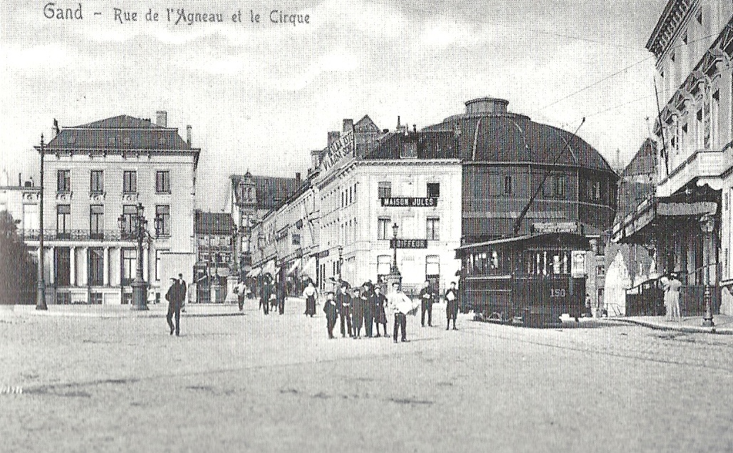 Het Nieuw Circus van Gent, waarschijnlijk voor de brand van 1920 - Lammerstraat - Gent - Oost-Vlaanderen - België